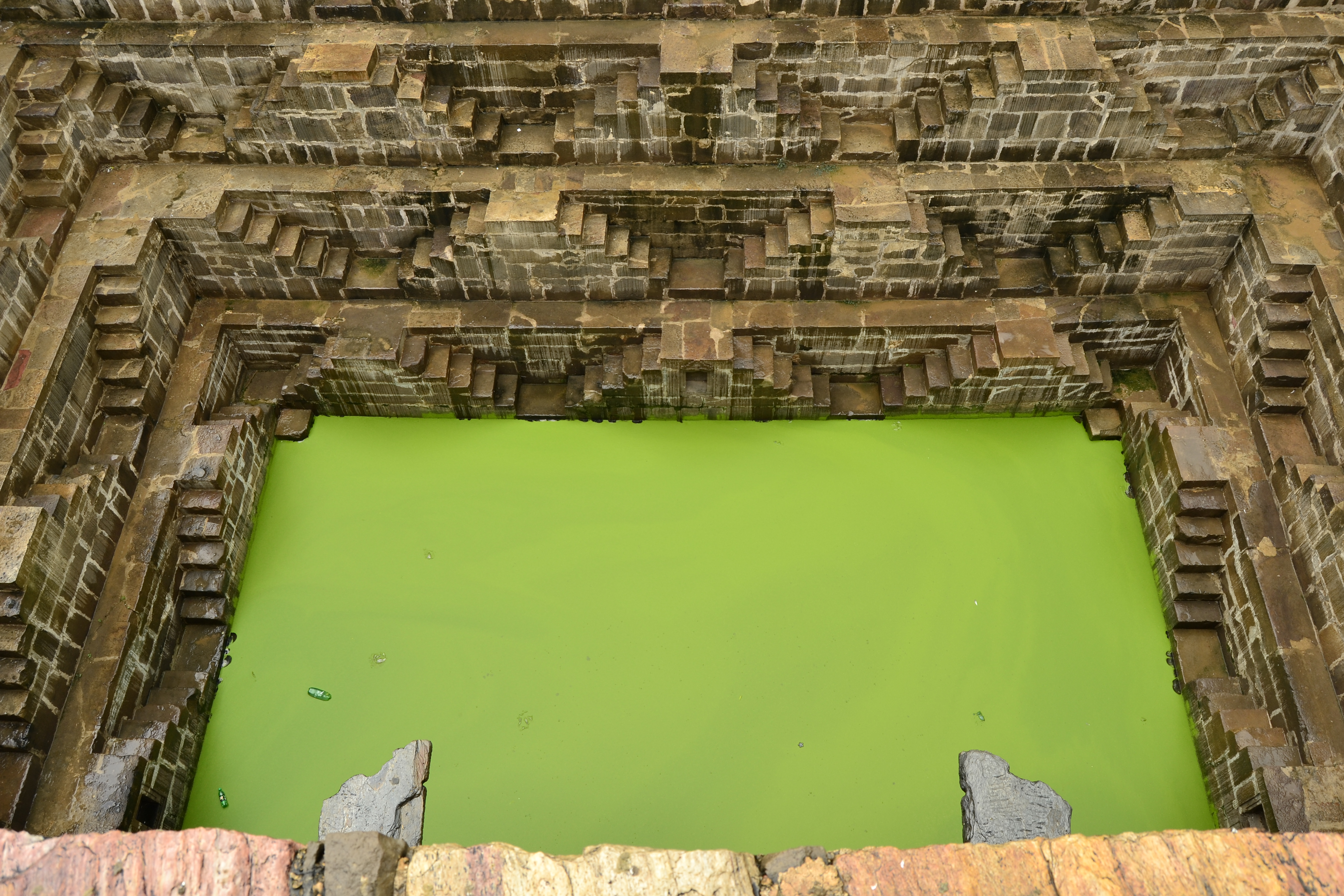 колодец Чанд Баори